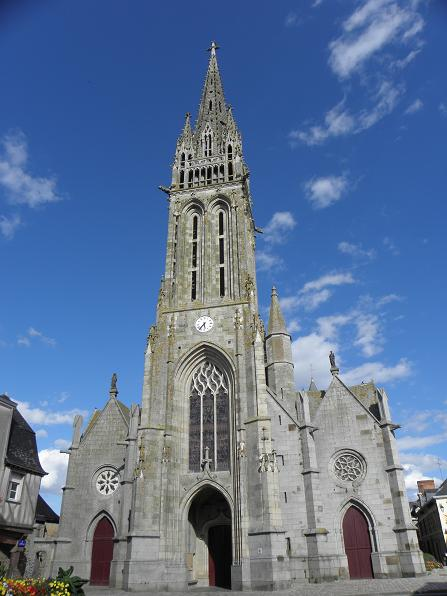 Basilique N.D. de La Guerche de Bretagne (35)